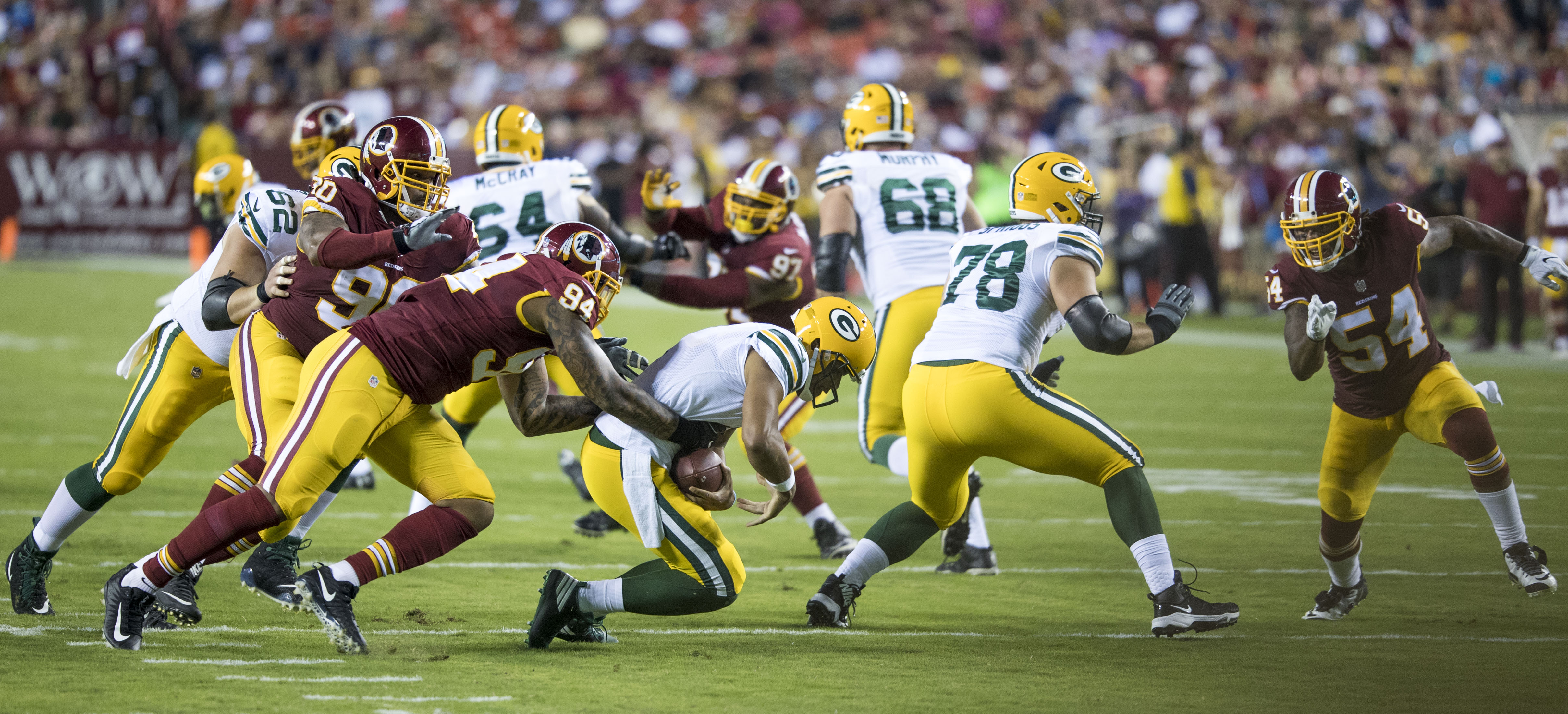 Packers at Redskins 8/19/17